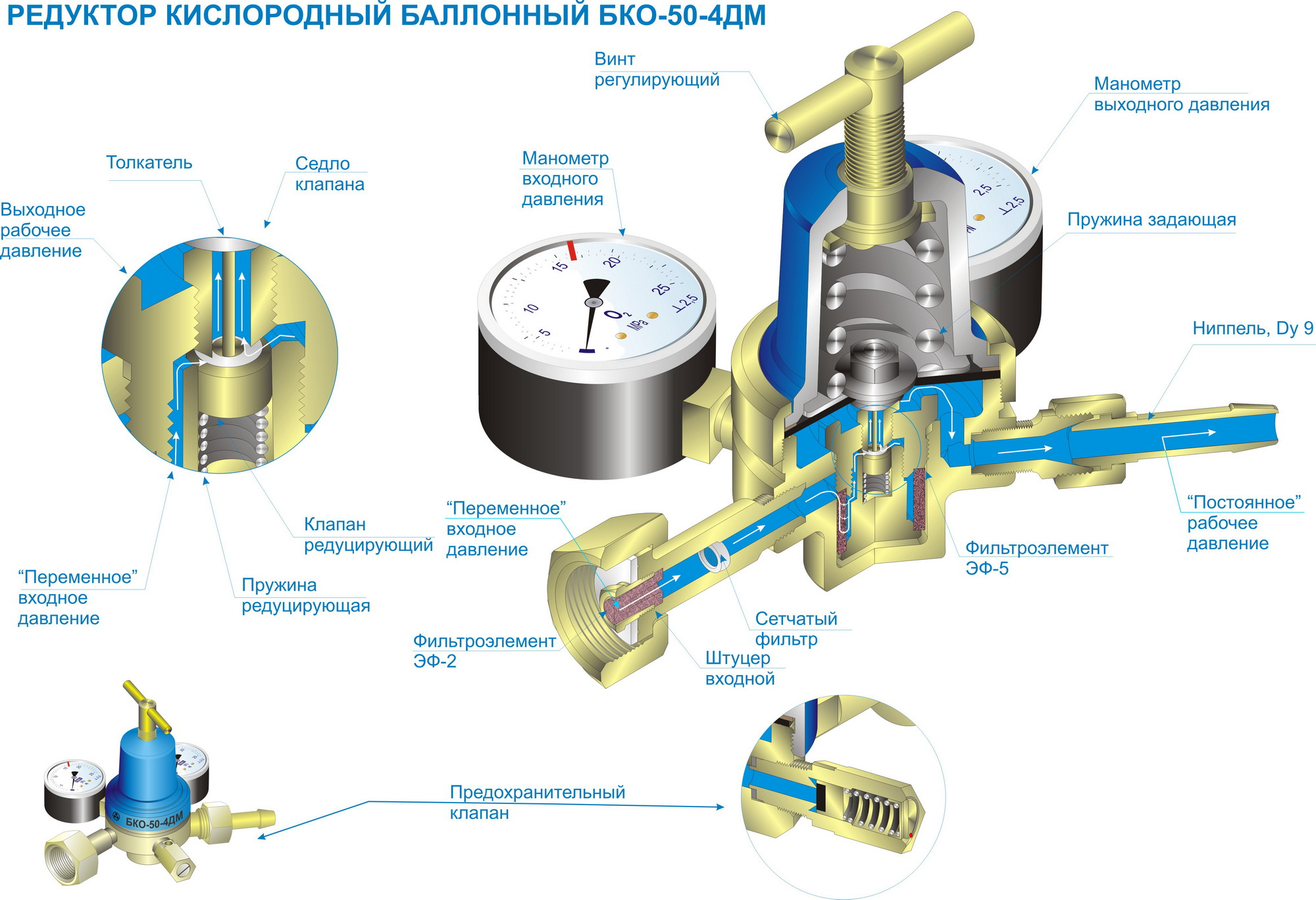 БПО-5ДМ